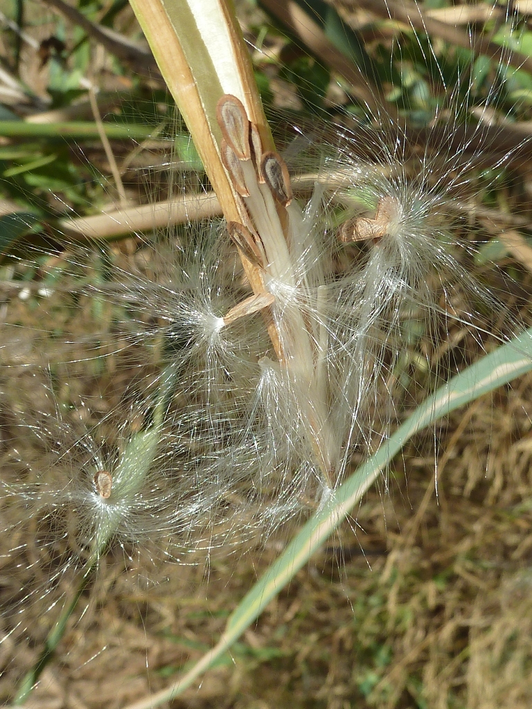 Cynanchum acutum (Matacán): Fruto maduro, con semillas - La Huerta/Camino de la Azarbe de Patricio - Albatera (Alicante, España).